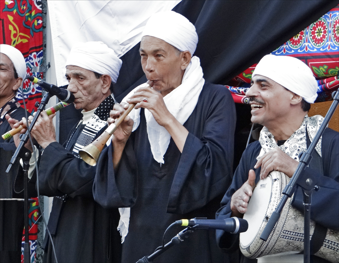 Instrumentistes des Percussions nubiennes (Nubian Drummers) devant le centre culturel d'Egypte Boulevard Saint Michel, Paris Fête de la musique 2012 Au centre un joueur de mizmar (hautbois égyptien, appelé Zurna en Iran ou en Turquie) Site du centre culturel d'Egypte (Paris)